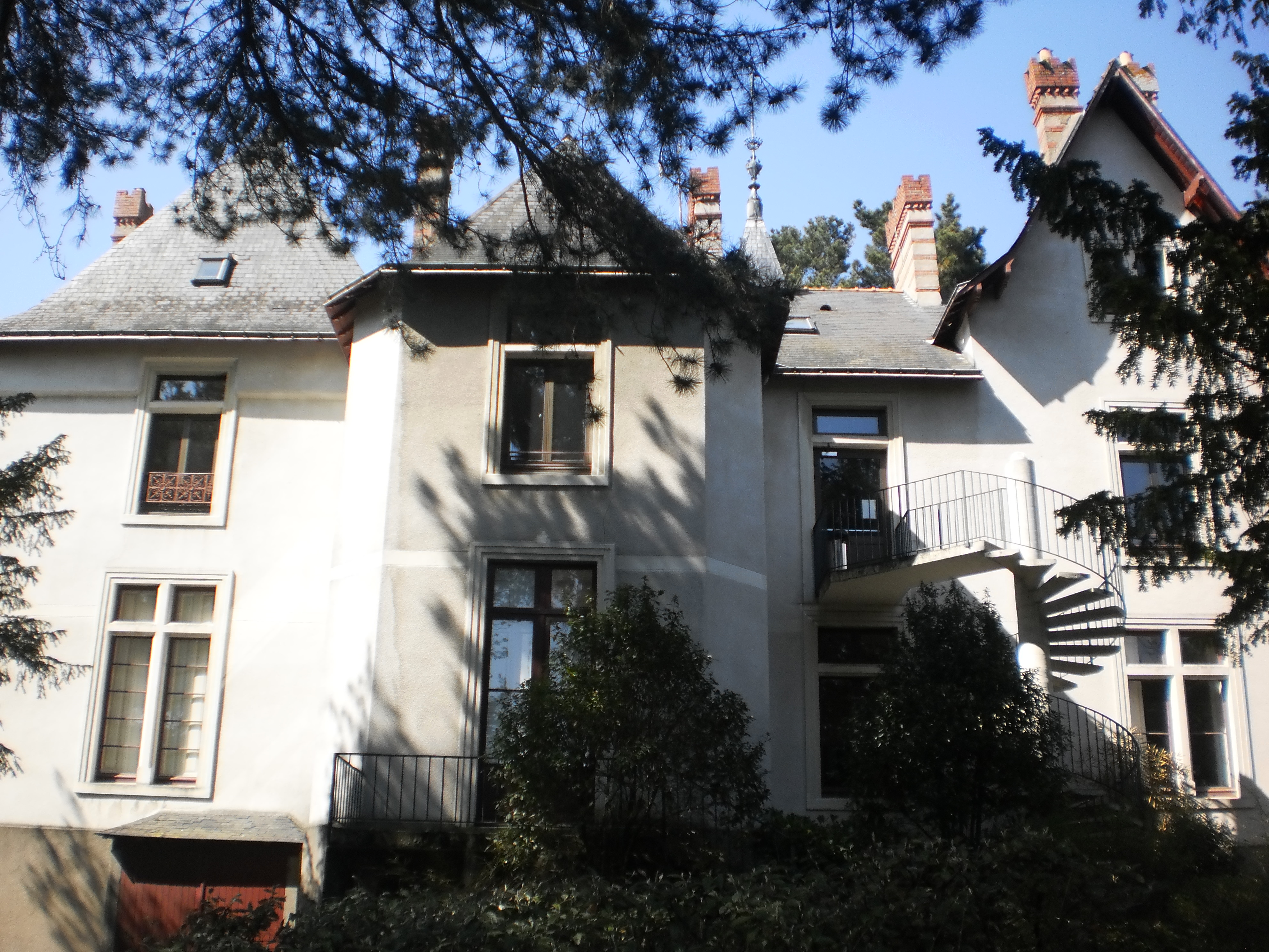 Hôpital Saint-Jacques de Nantes (France) - Le "Château", centre de formation des cadres This edifice is inscrit Monument Historique. Object location 47° 11′ 49.79″ N, 1° 32′ 13.56″ W This and other images at their locations on: Google Maps - Google Earth - OpenStreetMap - Proximityrama(Info)